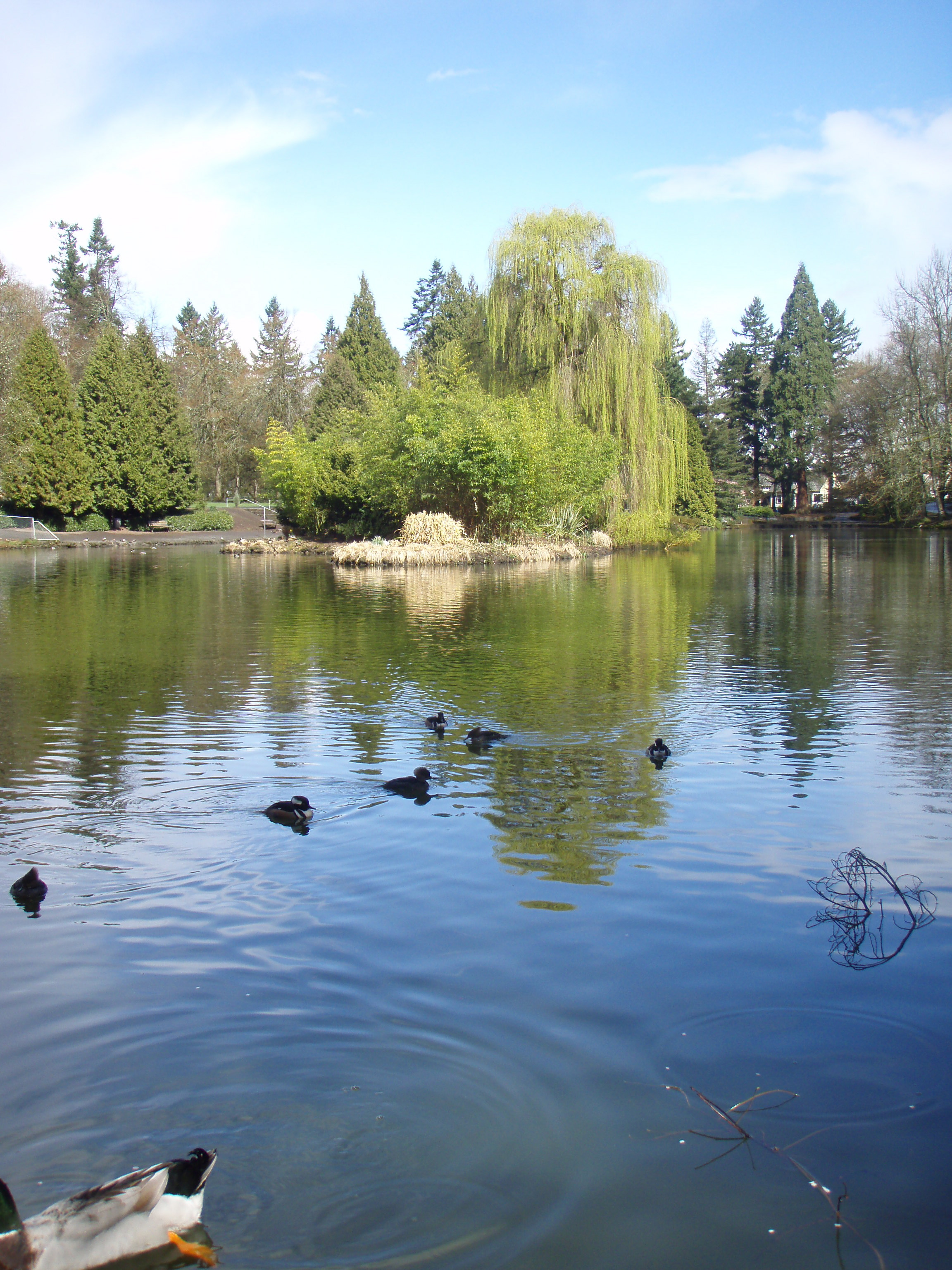 Laurelhurst Park in Portland, Oregon